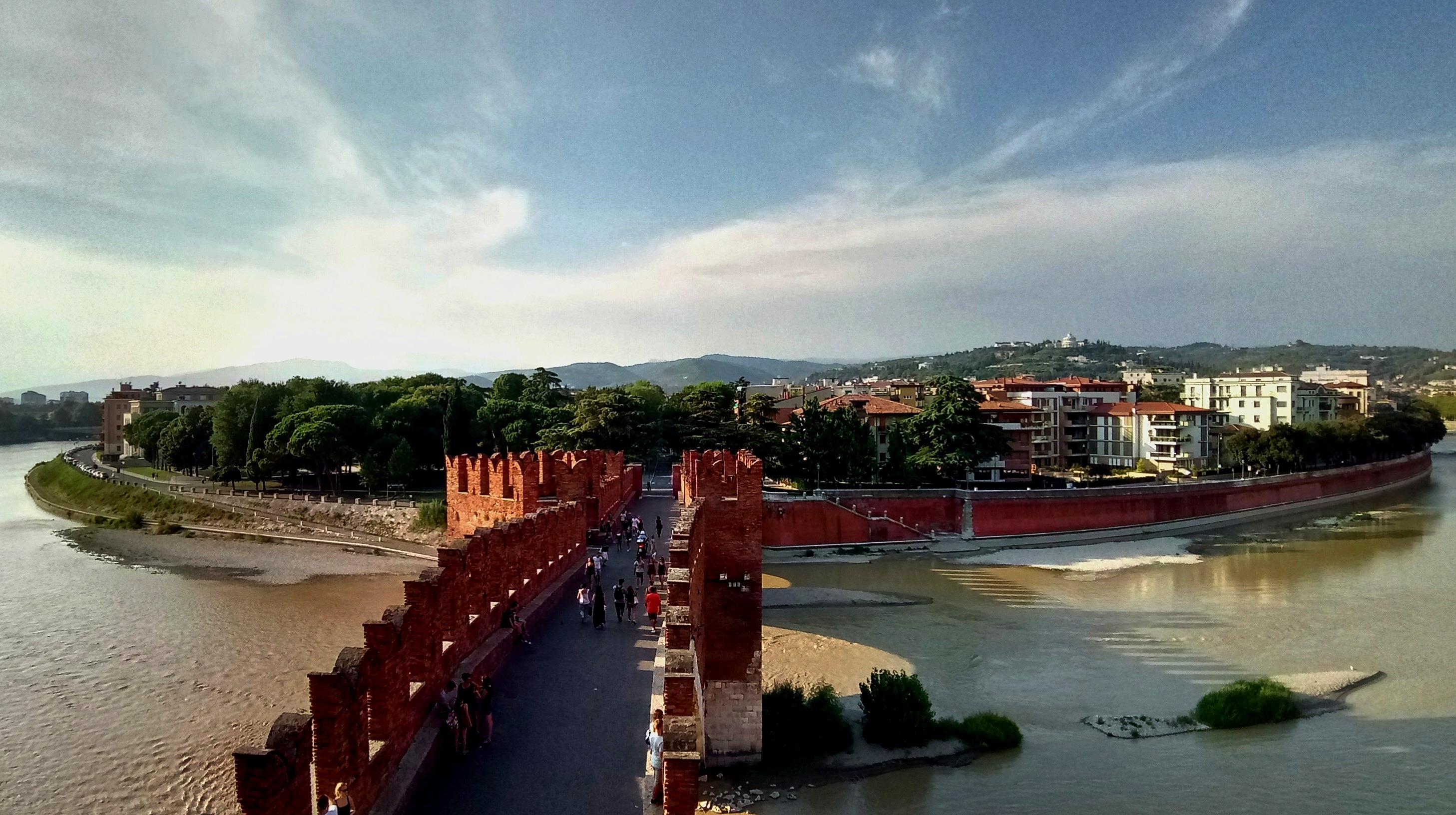 Ponte castelvecchio